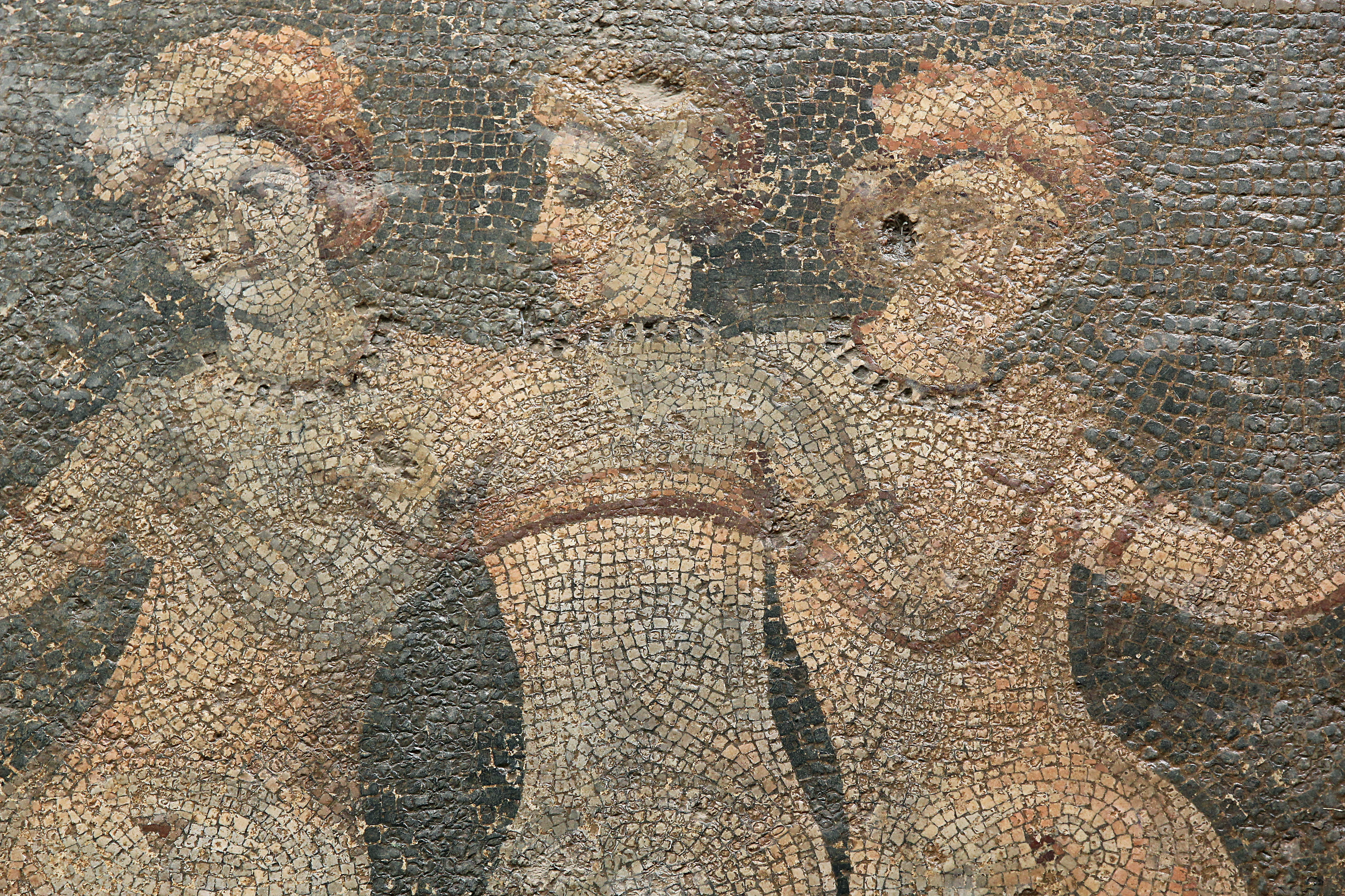 Mosaik der Drei Grazien in Narlikuyu bei Silifke, Südtürkei